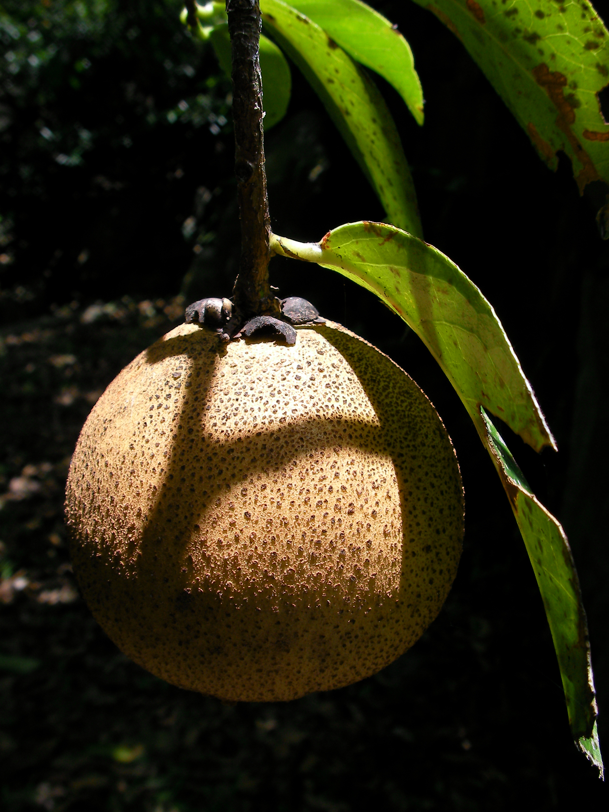 Fruit of Camellia granthamiana taken in Shing Mun Arboretum, Hong Kong